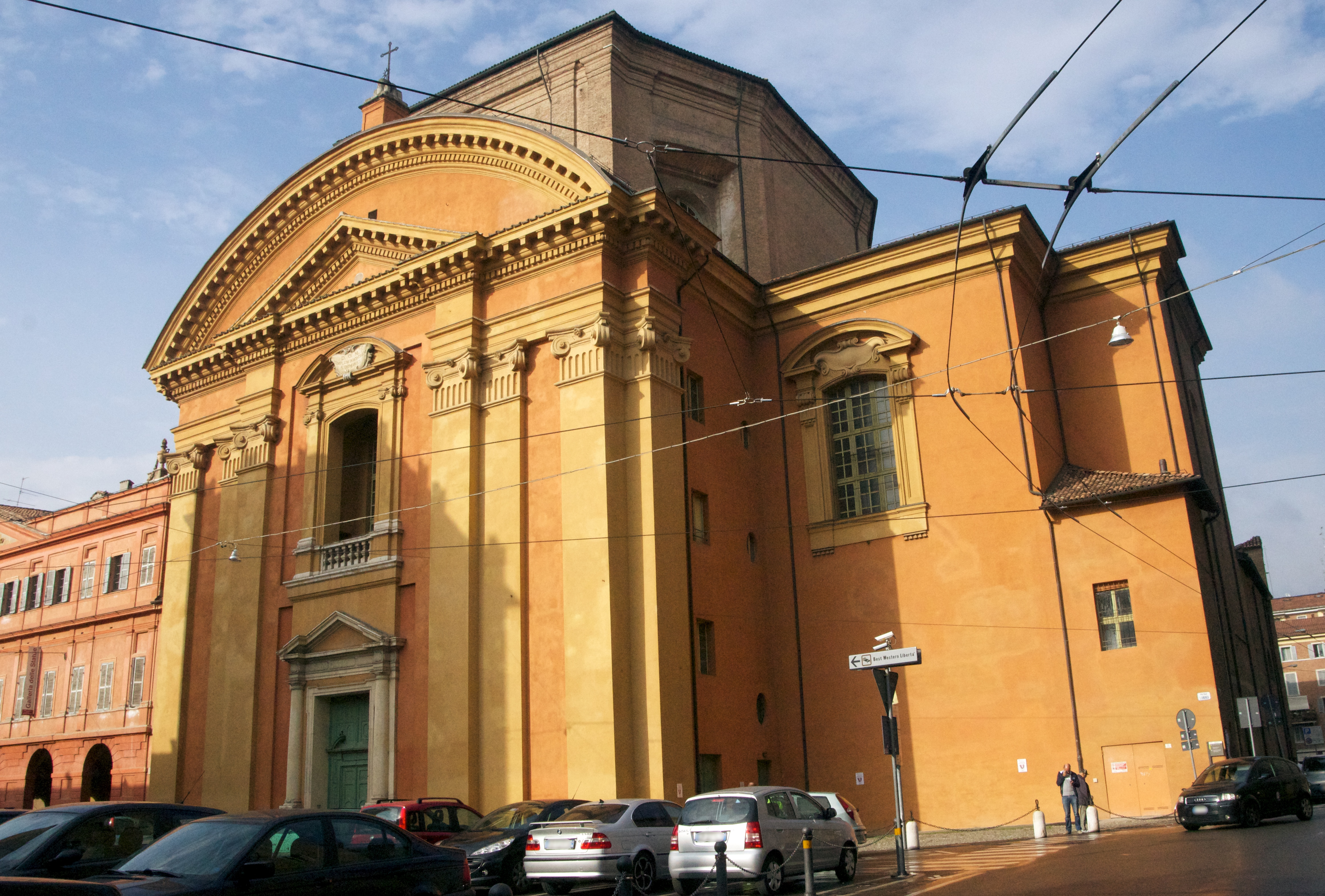 Chiesa di San Domenico This is a photo of a monument which is part of cultural heritage of Italy.